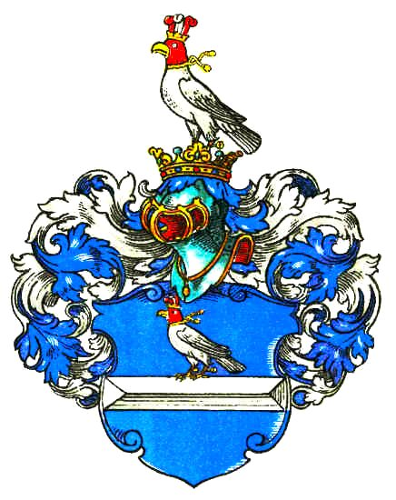 Wappen derer von Falkenhausen (des Stammes der Markgrafen von Brandenburg-Ansbach aus dem Hause Hohenzollern)